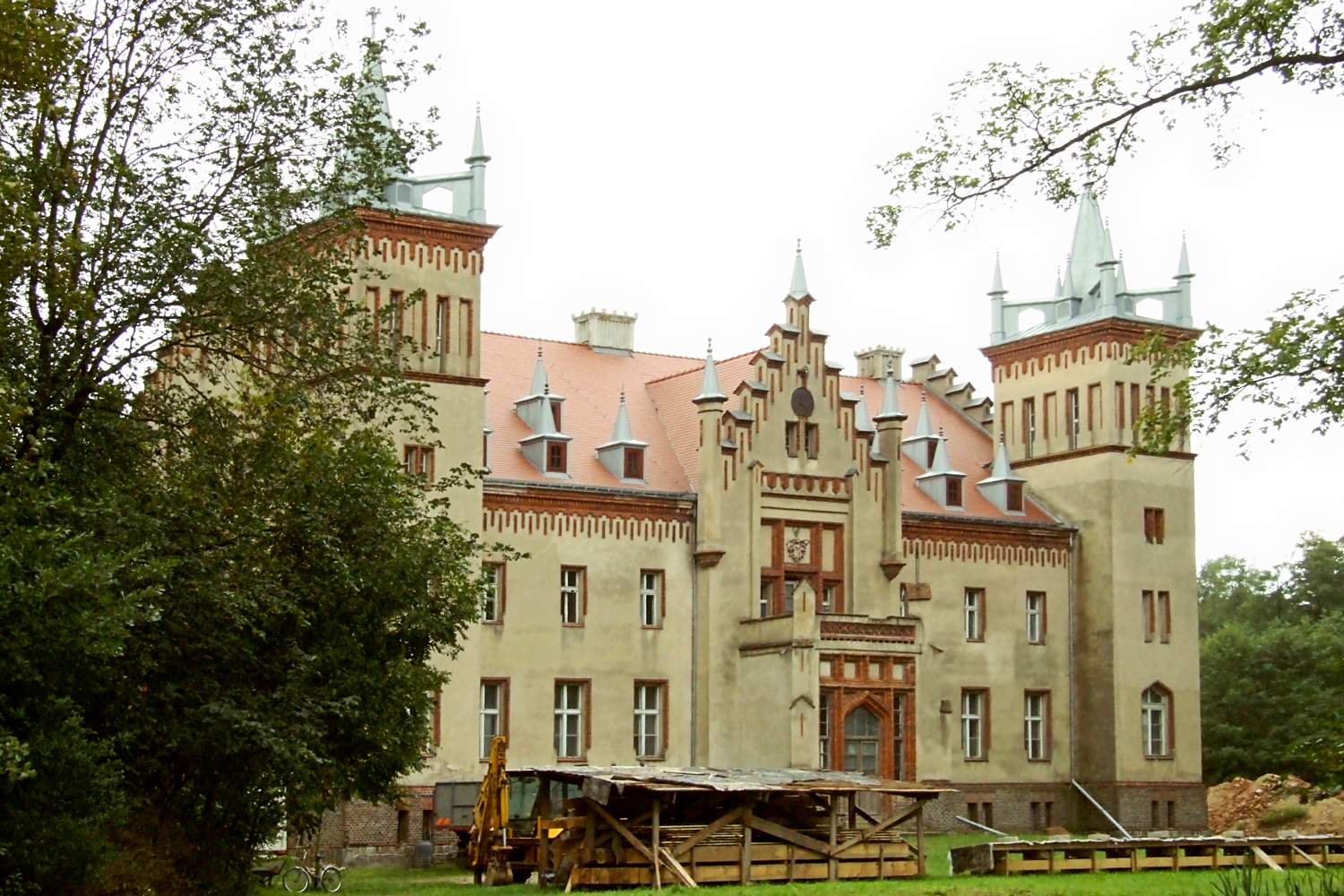 Rozbitek, pałac z lat 1856-58 (Rozbitek, palace)